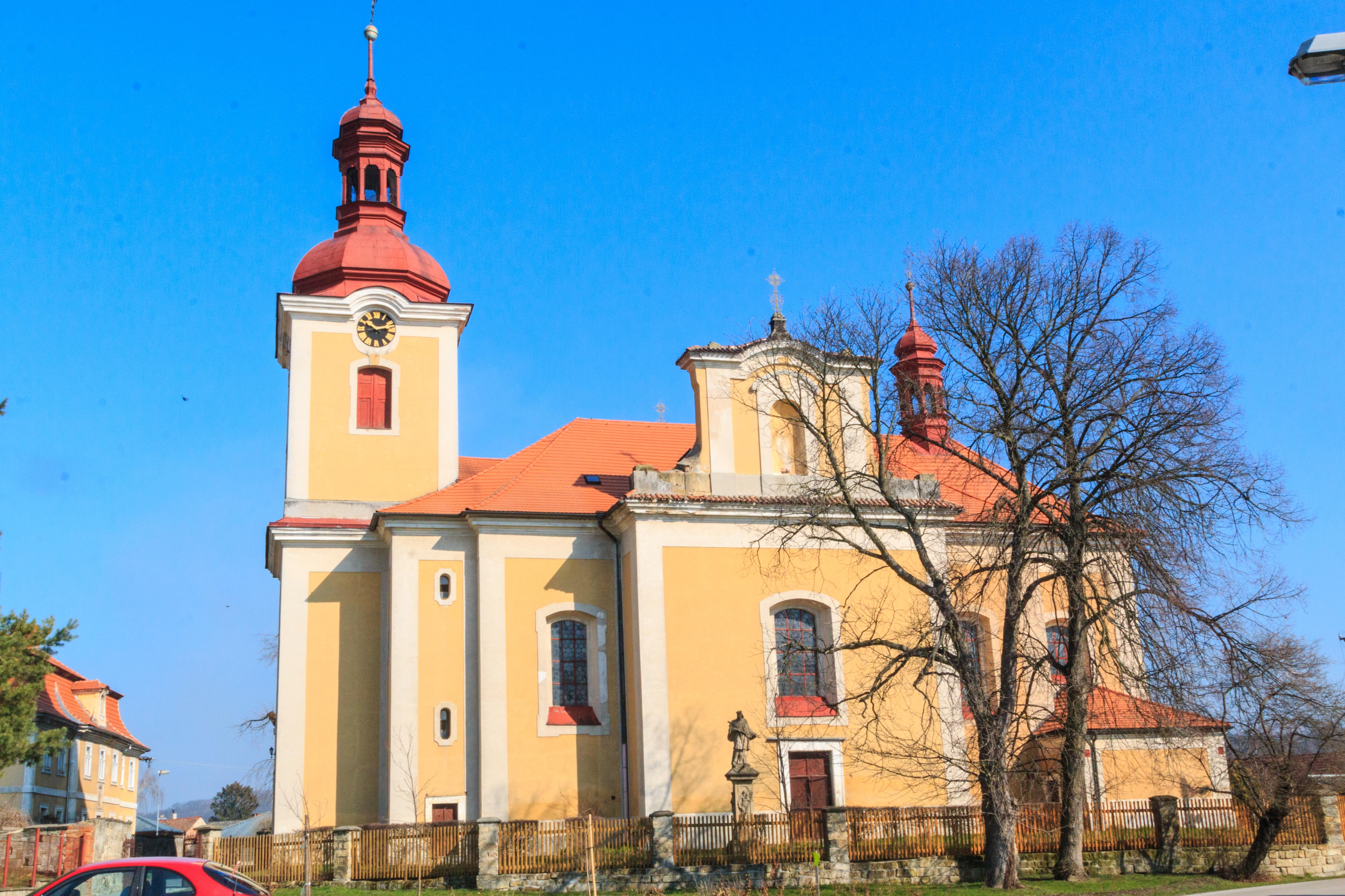 Kostel svatého Ducha, T. G. Masaryka, Jiráskova, st. 139, pp. 100, Libáň.